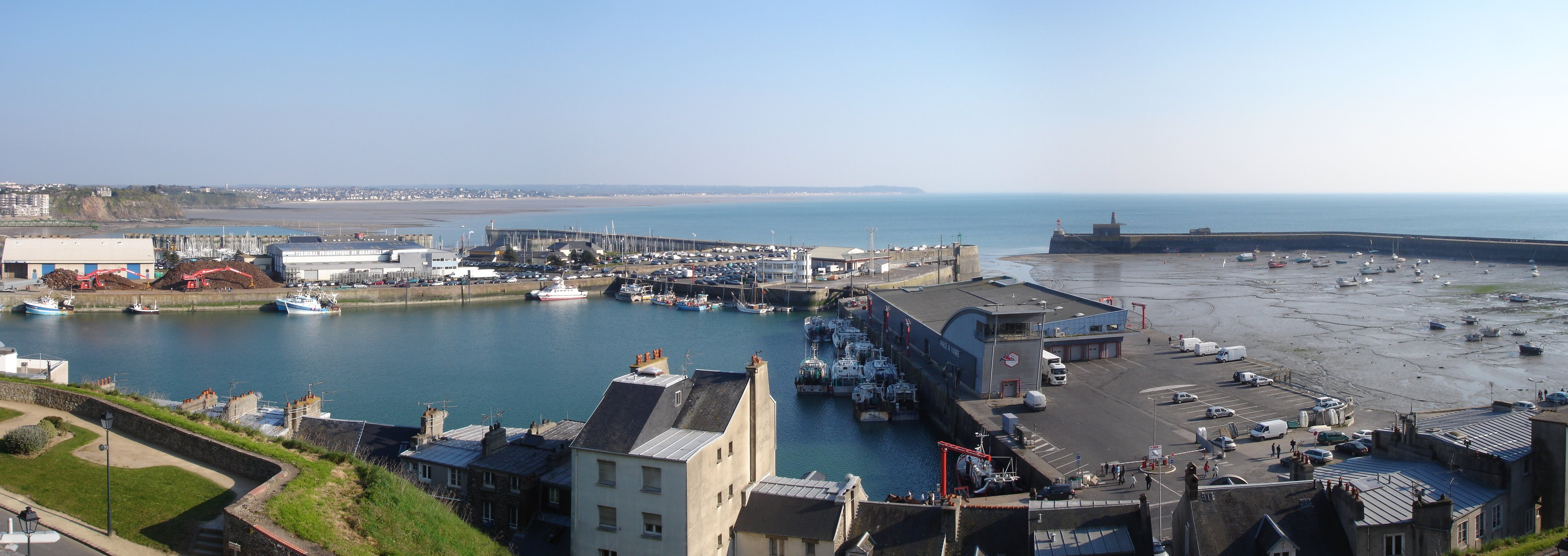 France, Manche (50), Granville, Panorama du port de Granville